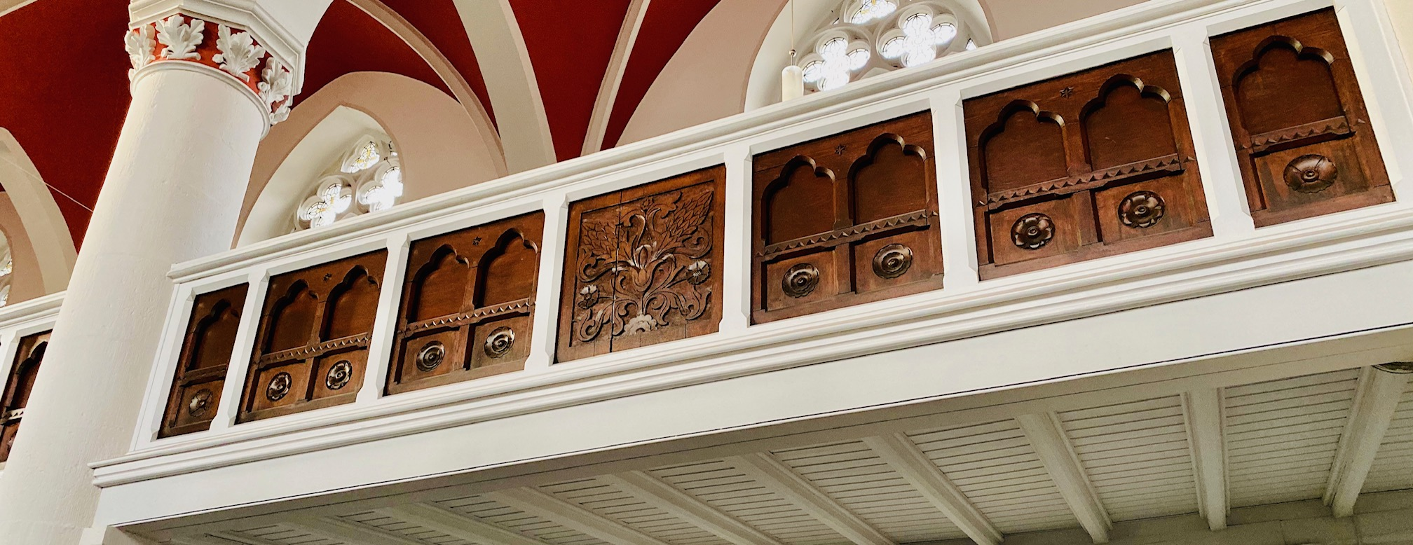 Emporenbrüstungen der Christuskirche